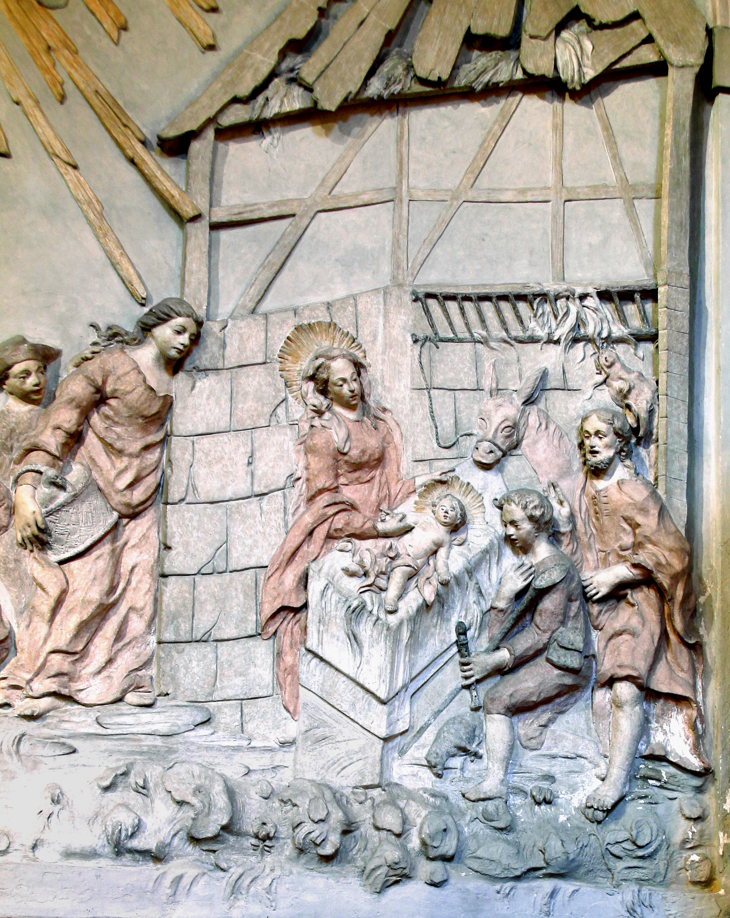 Trierer Dom, Marienkapelle: Anbetung der Hirten – Relief aus der Zeit um 1740 (Ausschnitt)